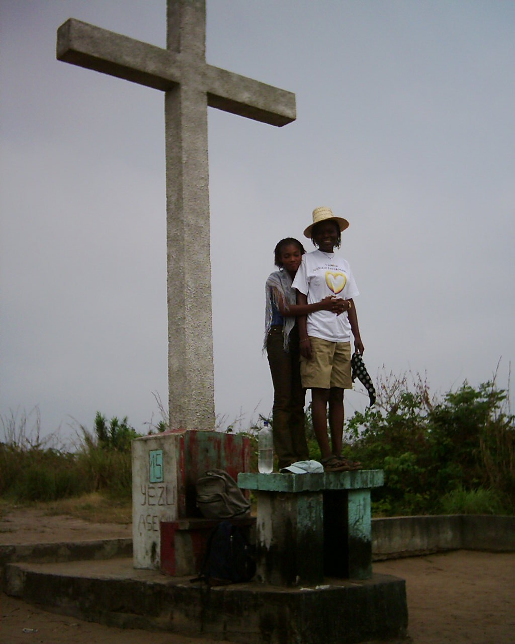 Mont Mangengenge, Kinshasa, RDC, summer 2003 Personal picture, I set it in public domain.